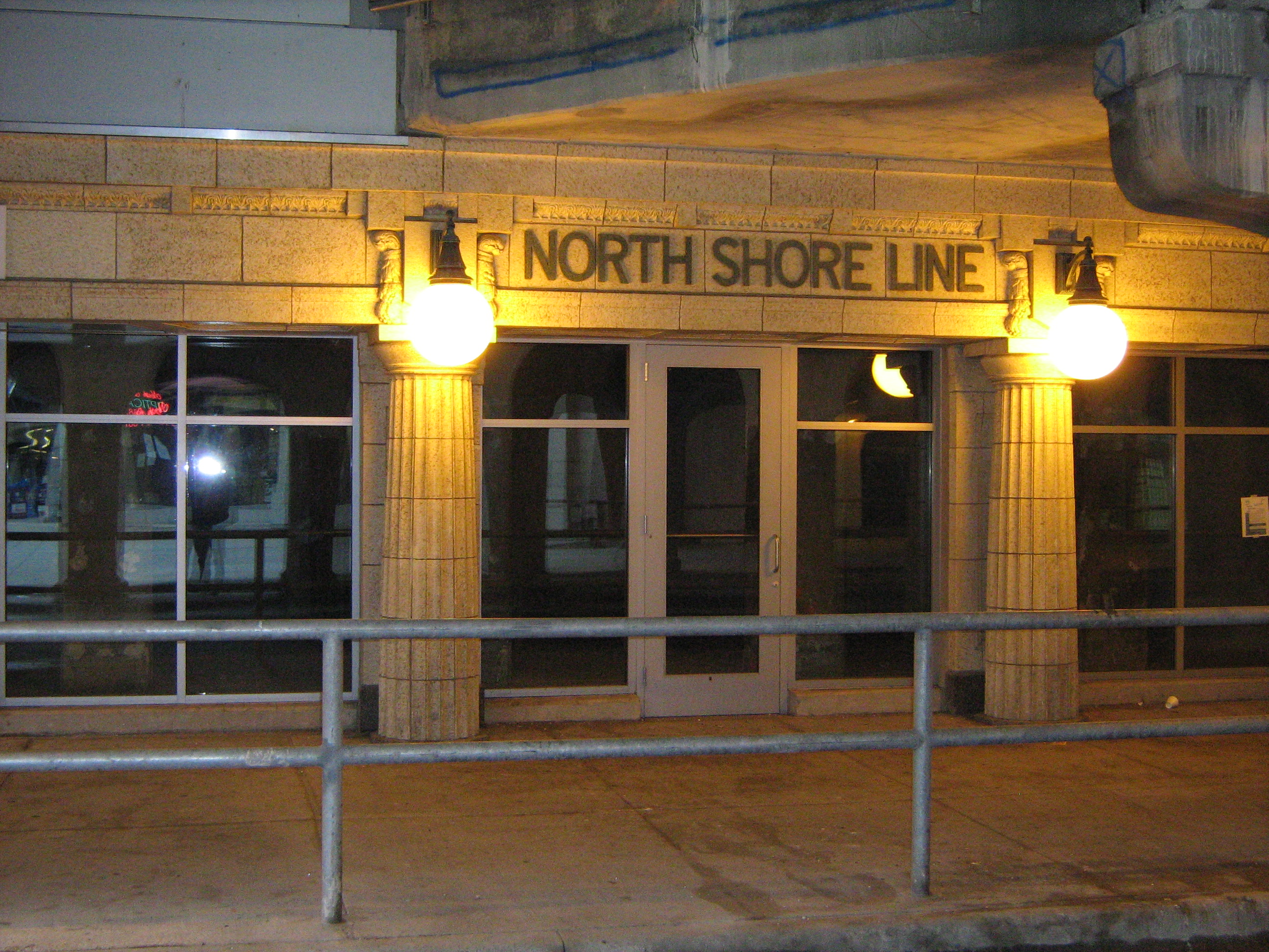 305 Howard St Evanston, IL 60202